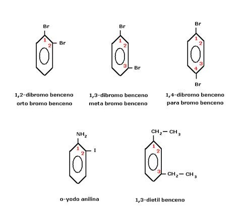 Nombres de algunos compuestos disustituidos del benceno